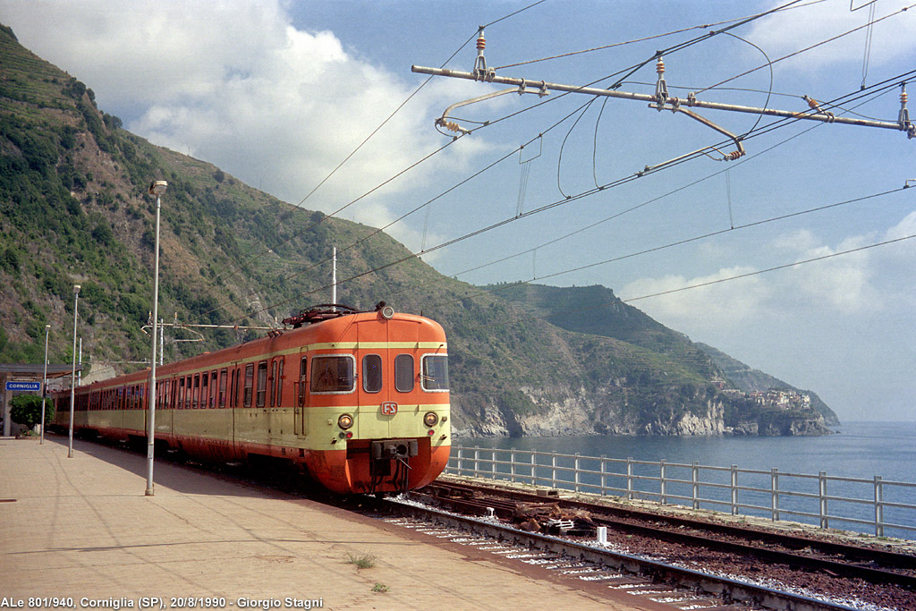 Stazione ferroviaria di Corniglia. In sosta una composizione di ALe 801/940.